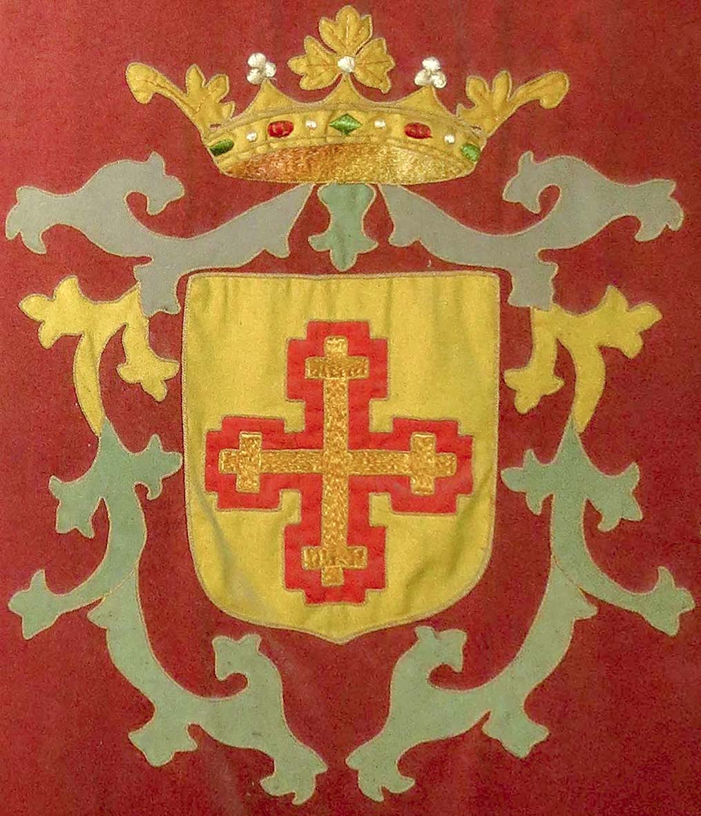 Repostero de finales del siglo XIX con Escudo Armas del marquesado de Vessolla